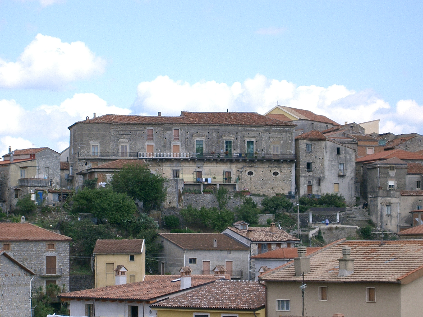 View of Castel Ruggero